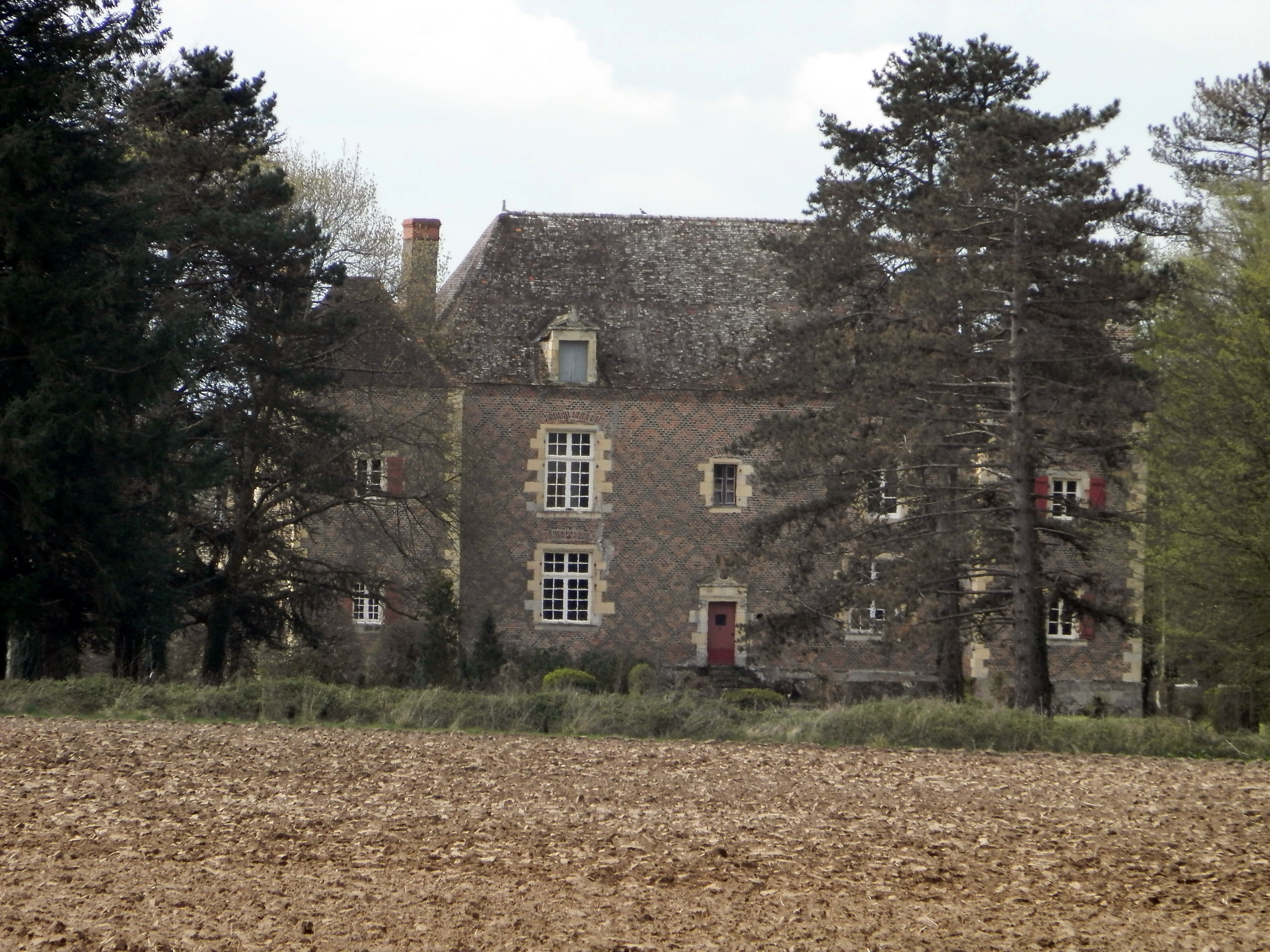 Chateau de Paray avant